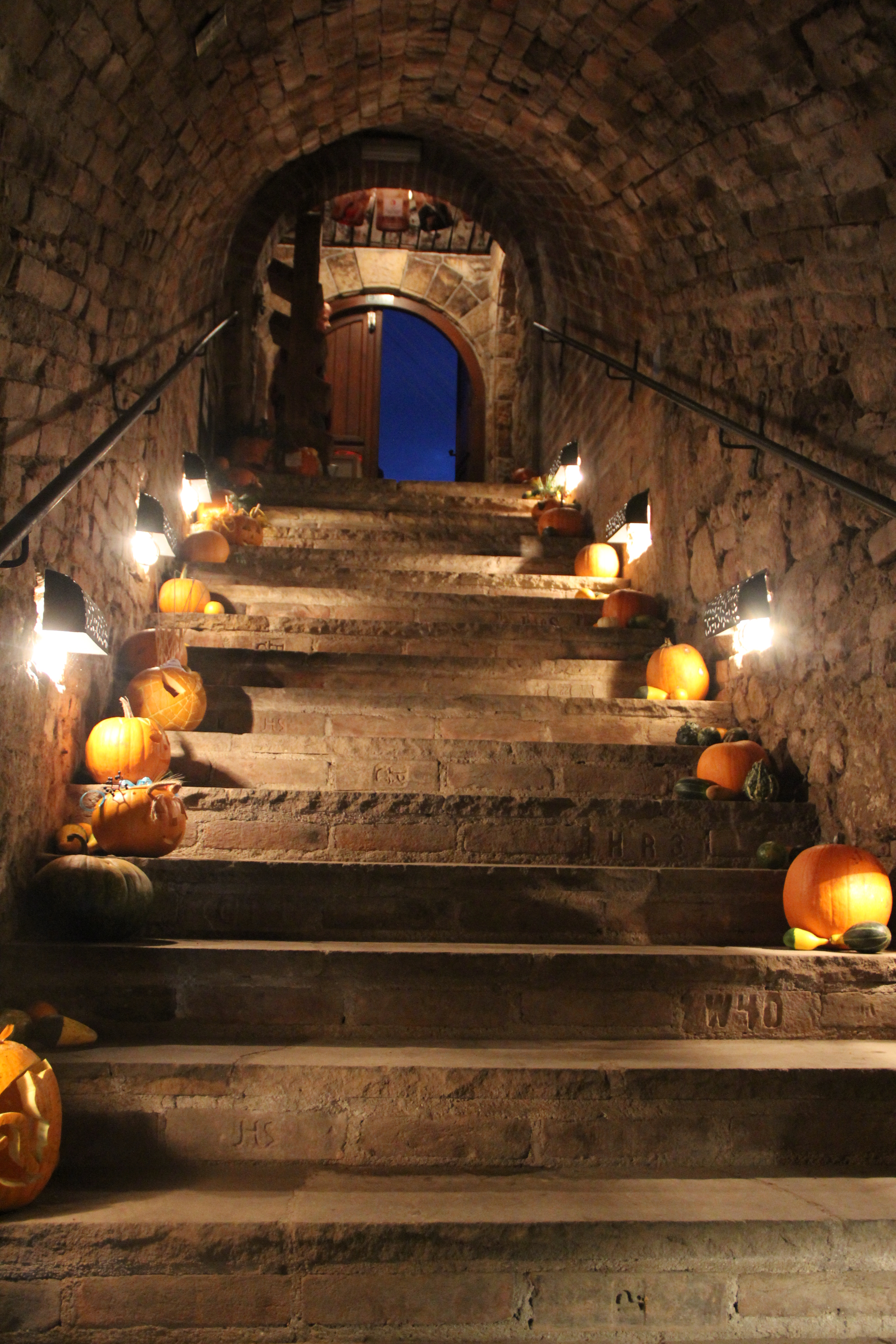 Jedny ze schodišť Valtického podzemí